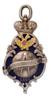 Description Жетон в память 75-летия Корпуса военных топографов Date1897Source мастерская Жетон в память 75-летия Корпуса военных топографов